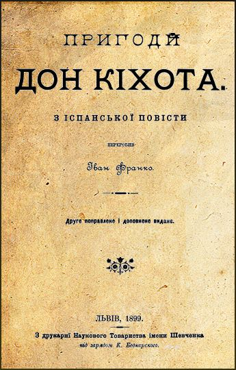 foto de portada